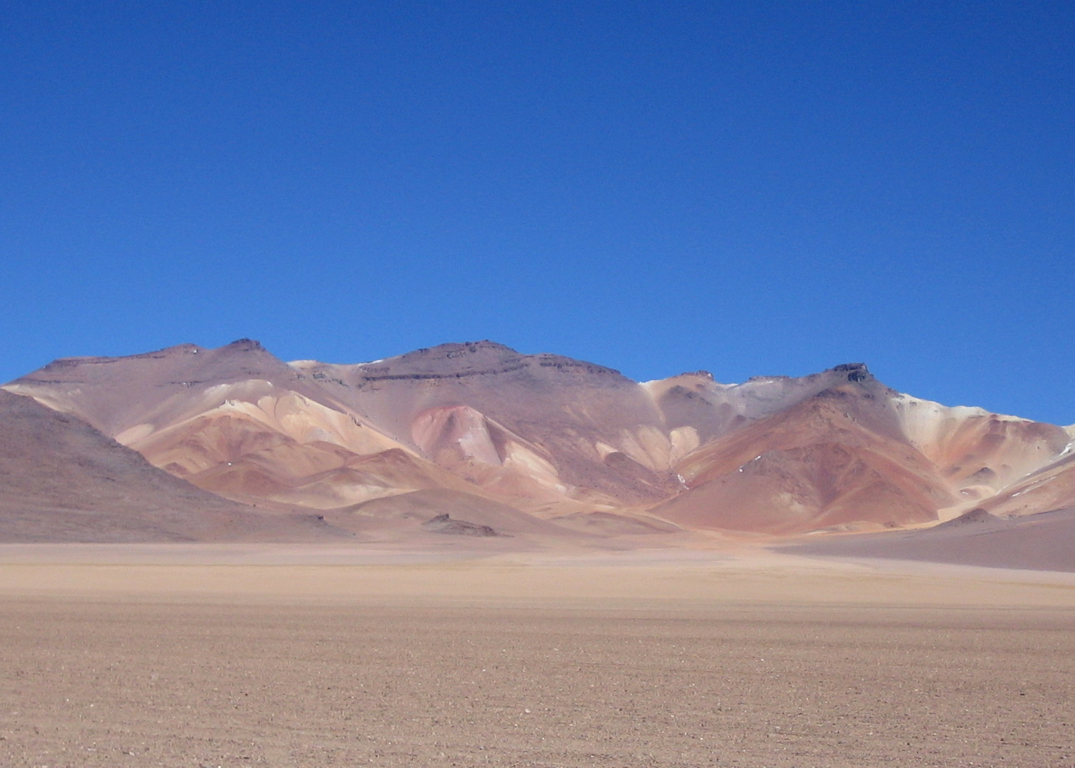 Desert Siloli, Bolivia